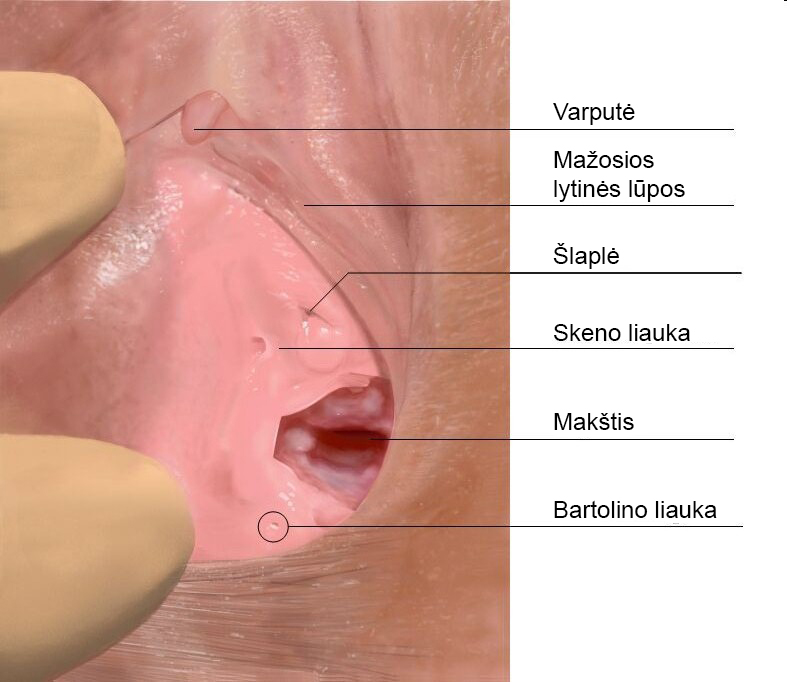 Skeno ir Bartolino liaukos